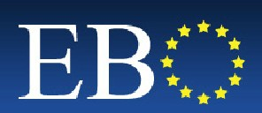 Signet der EU-Organisation "European Board of Ophthalmology" (EBO)